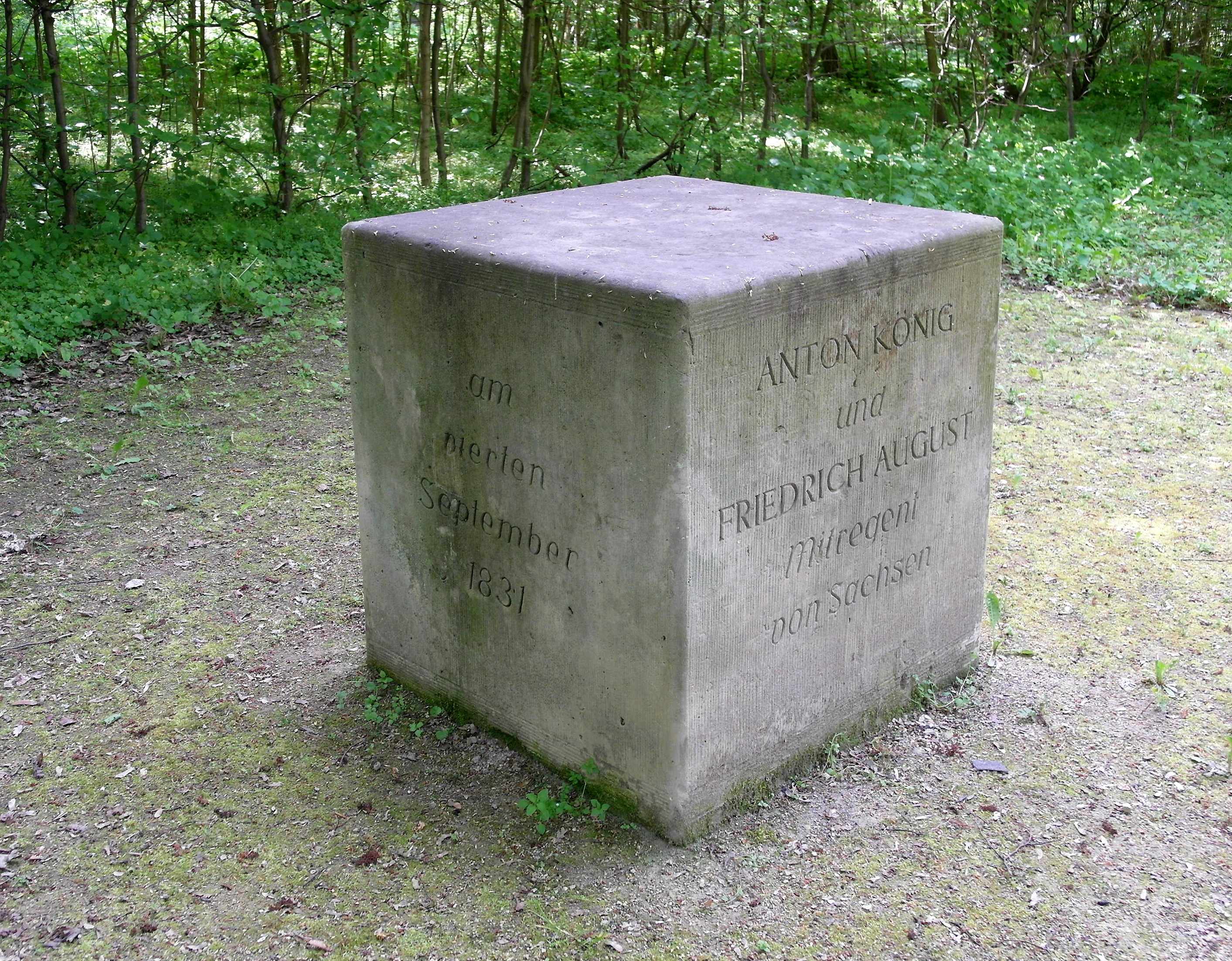 12.05.2017 01594 Ragewitz (Stauchitz), Schulberg 4: Der Verfassungs-Gedenkstein (GMP: 51.264391,13.239124) im Schloßpark erinnert mit dem 04.09.1831 an die Verkündung der ersten Sächsische Verfassung durch den König. [SAM9729.JPG]20170512205DR.JPG(c)Blobelt